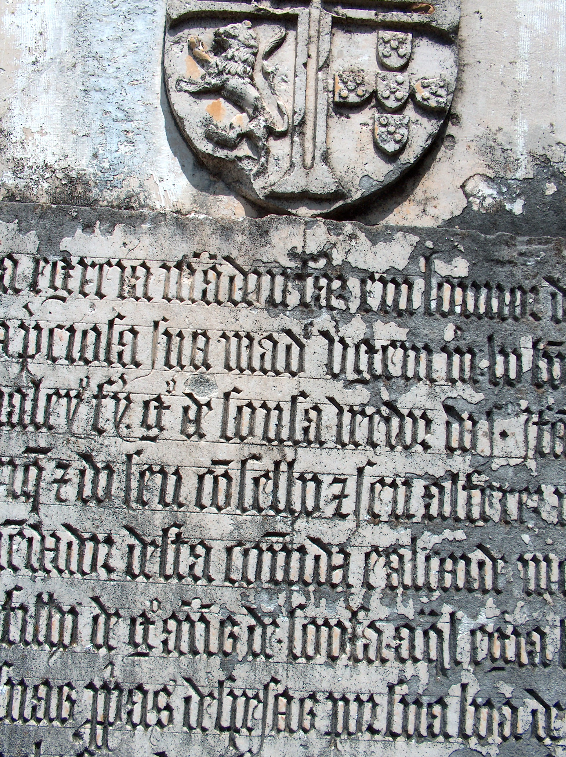 Torre de Dornes